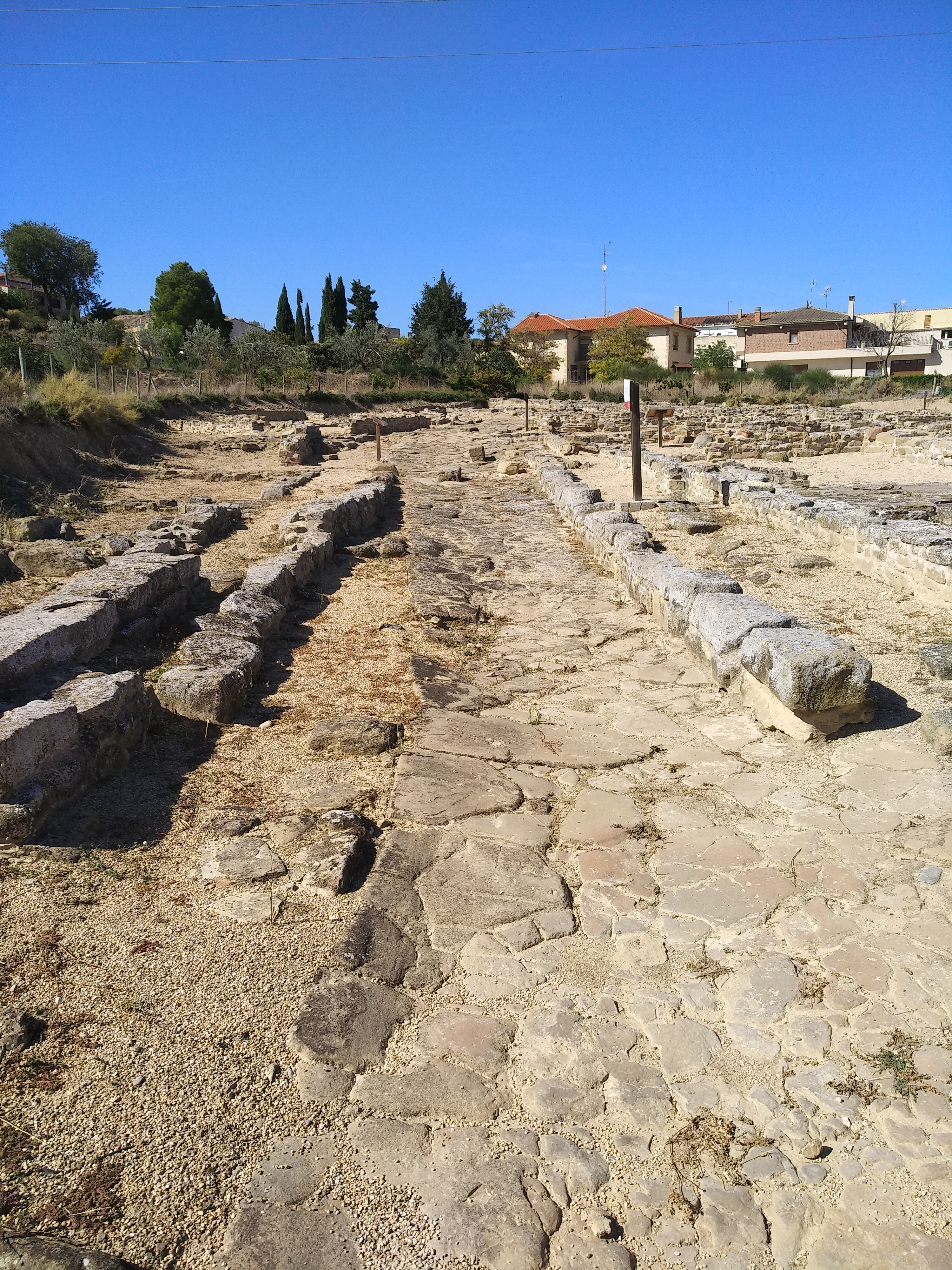 Calle en buen estado de conservación